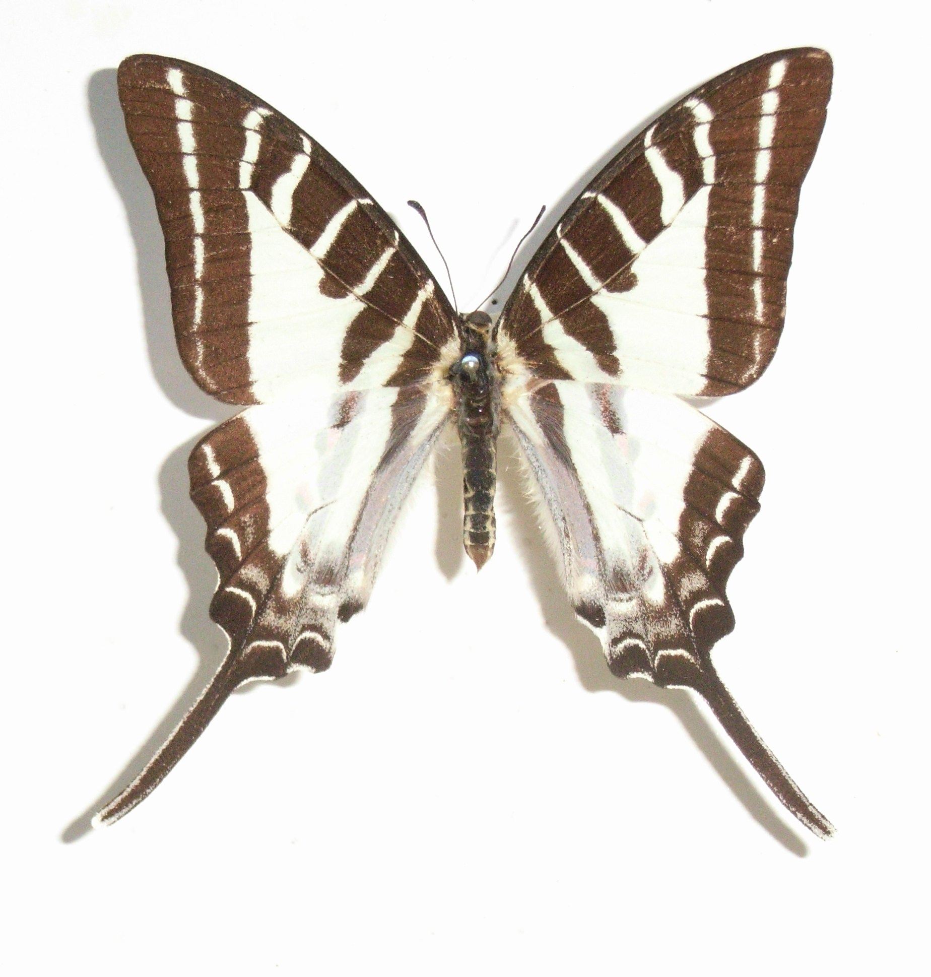 Graphium arusteus parmetus